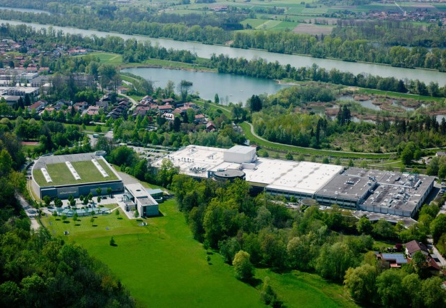 Luftaufnahme Standort Schattdecor Thansau